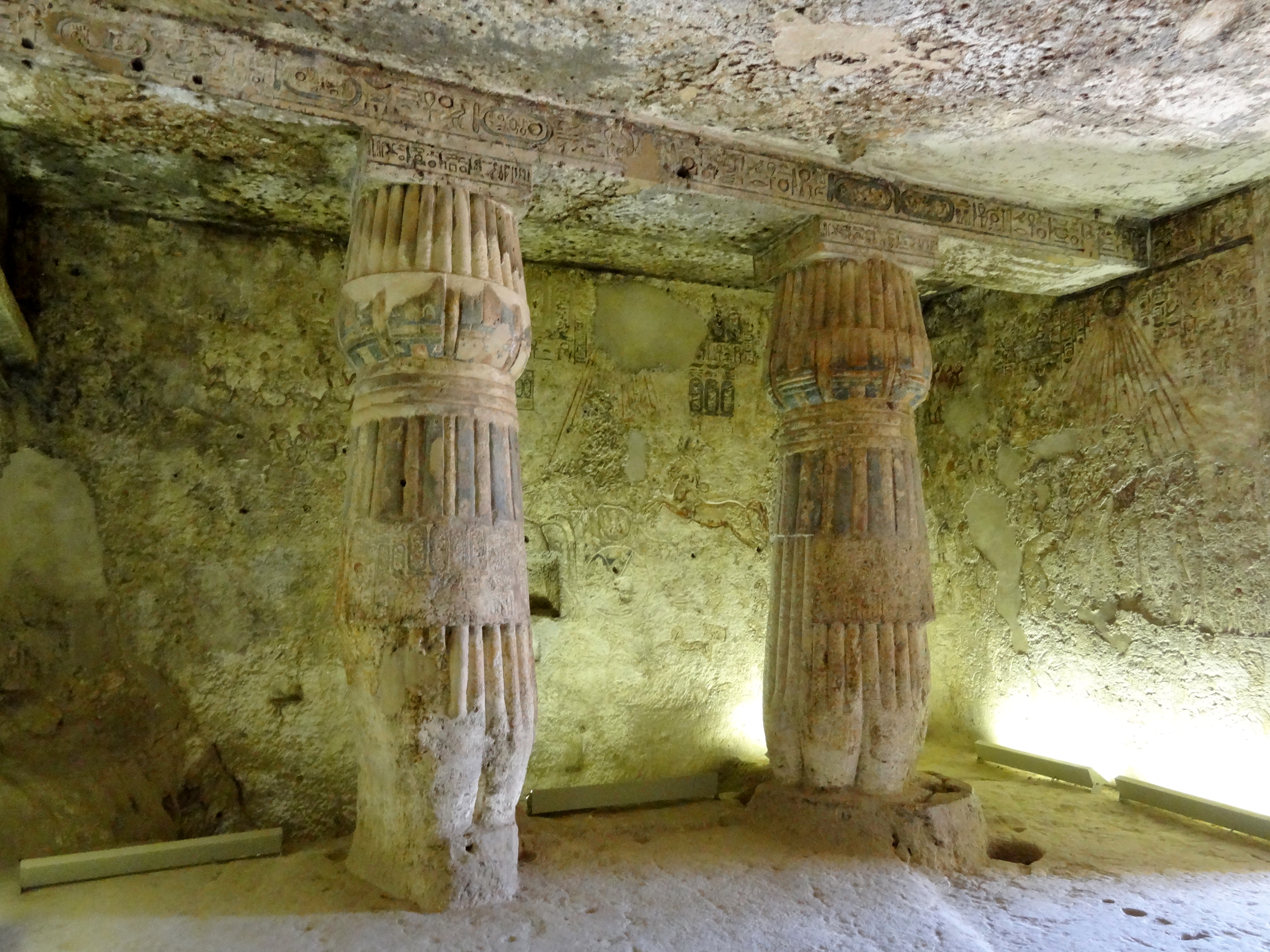 Grab des Panehsi (TA 6) in Tell el-Amarna, Ägypten